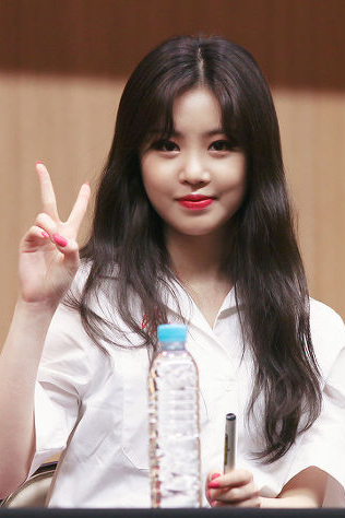 Português do Brasil: Seo Soo-jin no Fansign de Dangsan, em 18 de maio de 2018